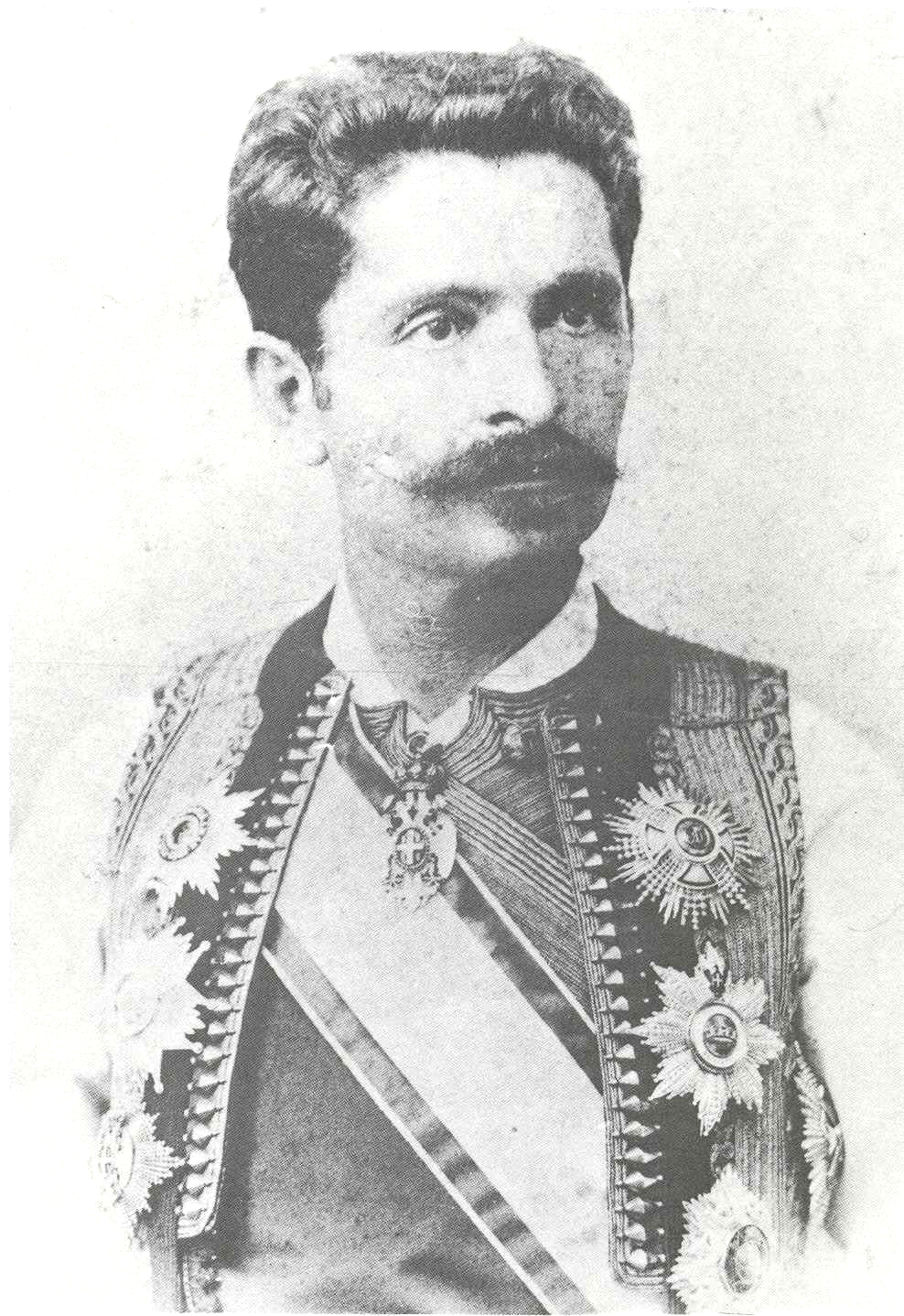 Srpski (latinica): Gavro Miljanov Vuković (1852 – 1928) vojvoda.